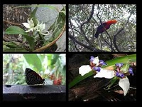 bellezas naturales